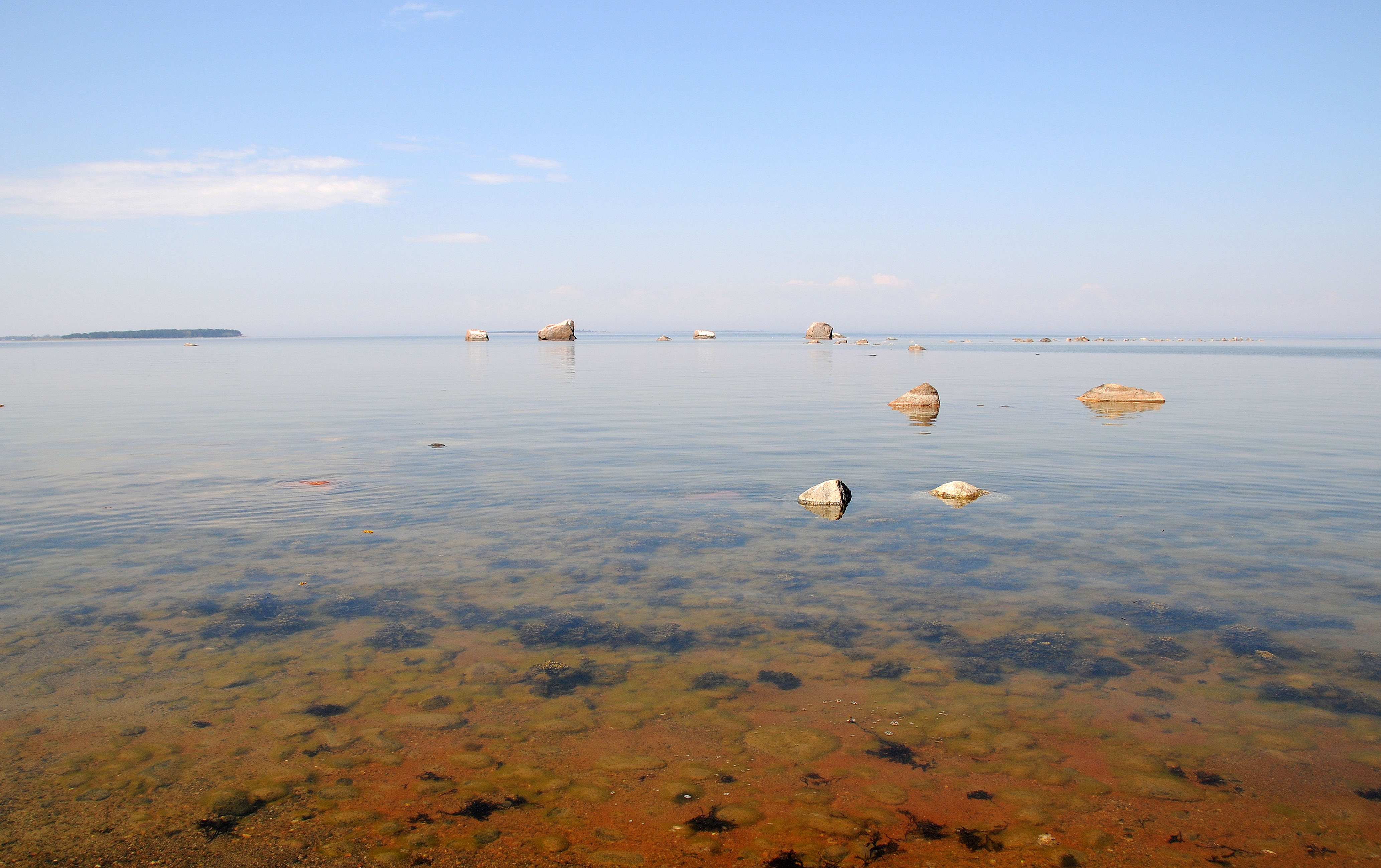 Pedassaar - vaade Landvaotsa rändrahnudele. Taamal Koipse ja Rammu saar